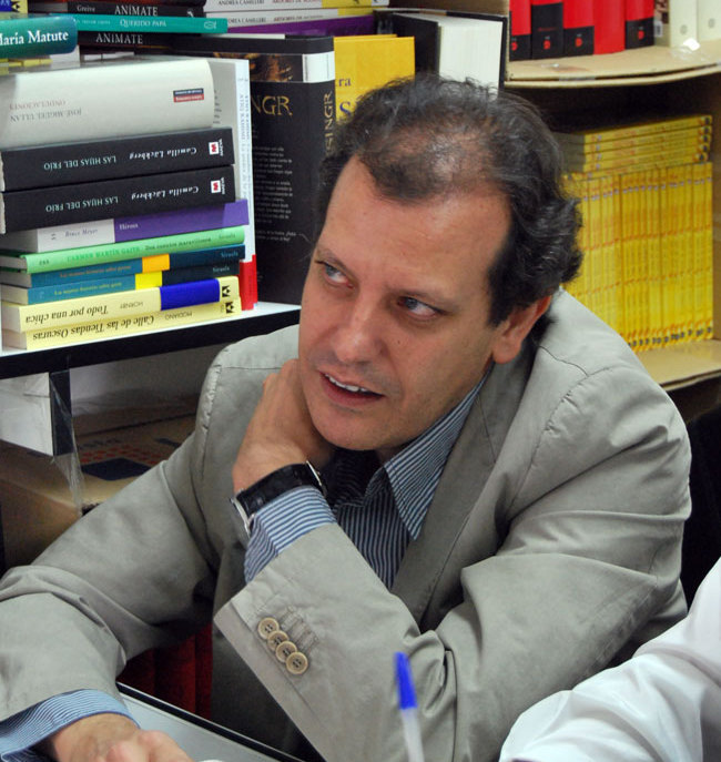 Fernando Rueda firmando libros en la Feria del Libro de Madrid.